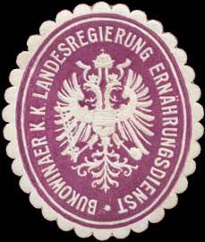 Sealing stamp Title: Bukowinaer K.K. Landesregierung Ernährungsdienst Description: rotbraun, weiß, geprägt Place: Czernowitz size: 4x4 cm